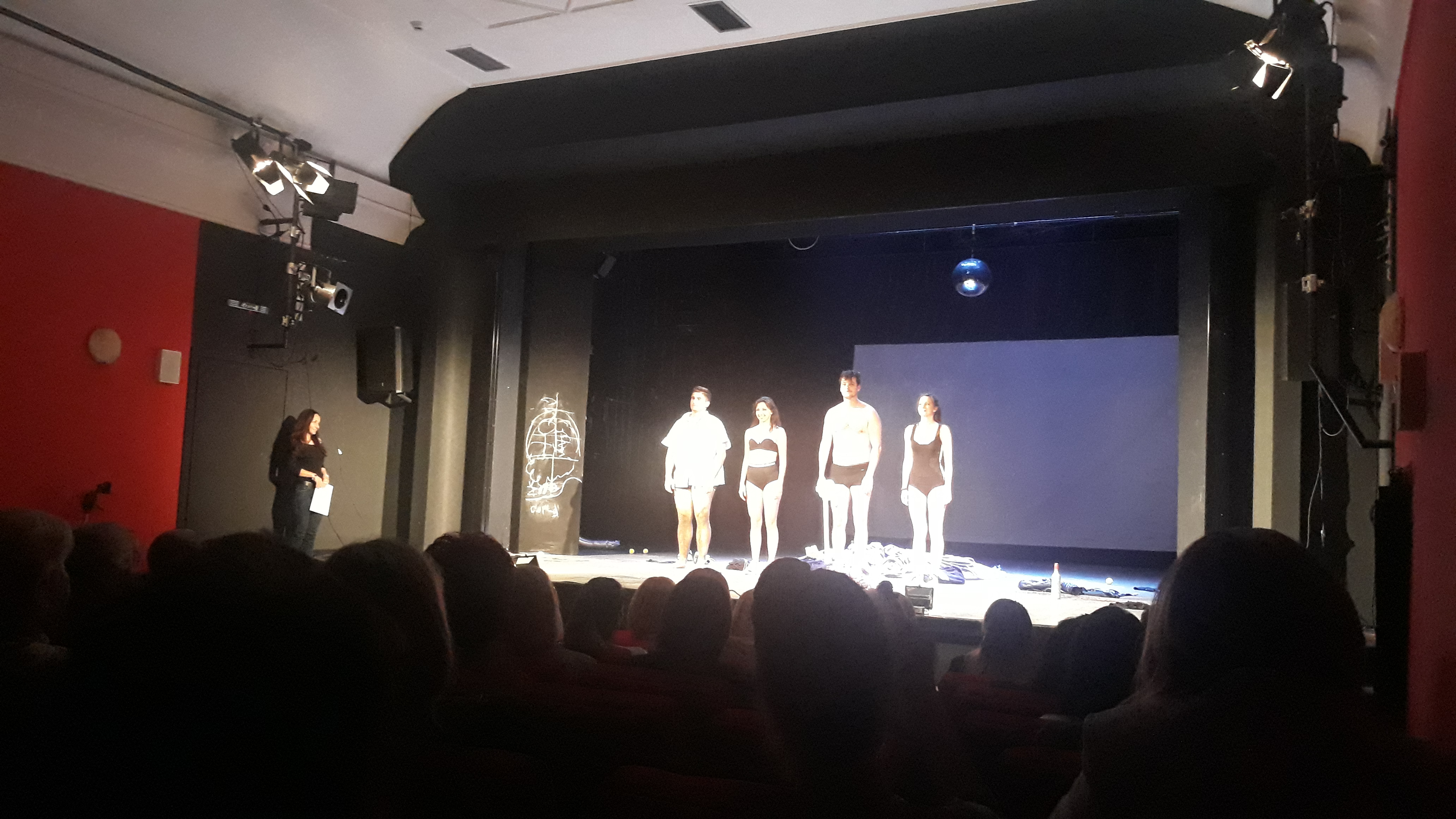 Кристина Пајкић, Страхиња Баровић, Милош Војновић и Јована Пантић након извођења представе Претпоследња панда или Статика, Шабачког позоришта, на затварању 55.Фестивала професионалних позоришта Србије „Јоаким Вујић“ у Краљеву.